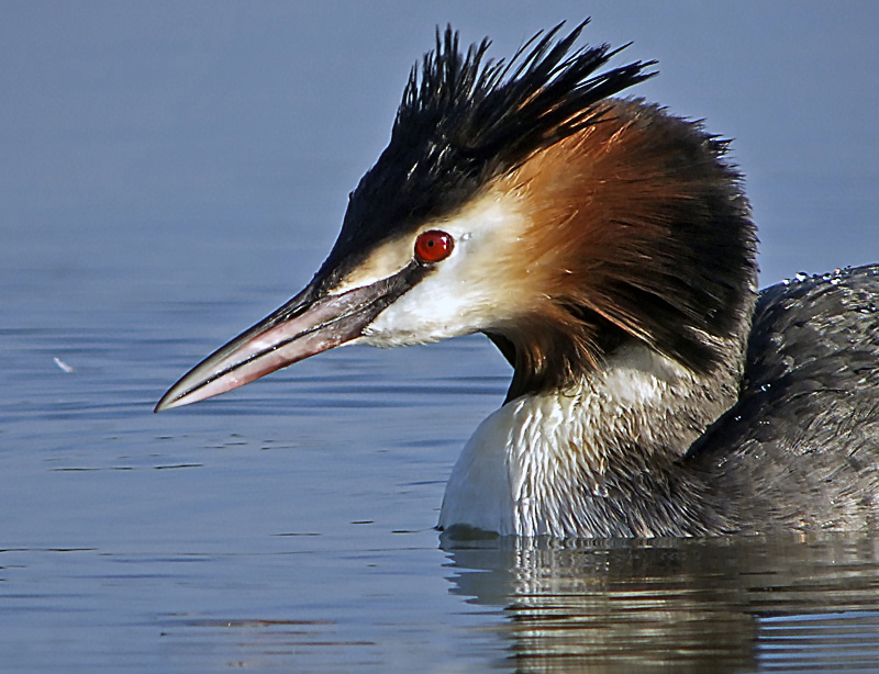 Podiceps cristatus, grèbe huppé.